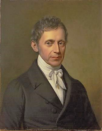 Porträt Matthias Sievers Bezeichnet u. r.: R. Suhrlandt.1845 Inv. Nr. 1909/146; MKK Lübeck